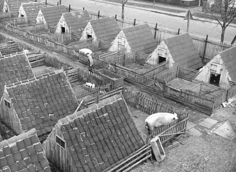 Schweinedorf, Schweineställe Zentralbild Biscan 28.3.1957 Schweinedorf im Kreis Staßfurt. Die LPG "Ernst Thälmann" in Förderstedt, Kreis Staßfurt, hat zur Zeit rund tausend Schweine, darunter hundert Sauen. Die Läufer, Jungeber und Jungsauen sind in 37 Schweinehütten untergebracht, die zusammen ein kleines Dorf bilden. Die Schweinehütten haben sich bei der LPG gut bewährt. Nur zum Abferkeln werden die Sauen in gemauerte Ställe gebracht. UBz: Blick auf einen Teil des Schweinedorfes der LPG. Alle Schweinehütten sind mit Ziegel gedeckt, wodurch sie auch bei starkem Regen innen trocken bleiben."